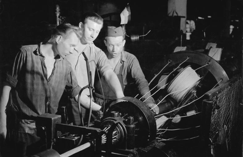 Brigade "Fritz Ploen" auf dem richtigen Weg. Zu Ehren des 10. Jahrestages der DDR nahm die Brigade "Fritz Ploen" aus der Verseilerei der Drahtfabrik des Kabelwerkes Oberspree, Berlin-Oberschöneweide, den Kampf um den Titel "Brigade der sozialistischen Arbeit" auf. Anfangsschwierigkeiten wurden durch Unterstützung der Brigade "Max Reimann" überwunden. Heute können die Brigademitglieder stolz berichten, daß sie entsprechend ihrer Verpflichtung ihren aufgeschlüsselten Plan im 1. Quartal 1960 mit 104,8% erfüllten. Durch zahlreiche Verbesserungsvorschläge konnte die Brigade bereits 1200,-DM in den Siebenjahrplanfonds einzahlen. Nachdem jetzt weitere sechs Verbesserungsvorschläge eingereicht worden sind,wollen die Brigademitglieder in diesem Jahr rund 4000.- DM dem Fonds überweisen. UBz: (v.l.n.r.) Horst Fetsch, Brigadier Helmut Linke und Wolfgang Müller beraten über die unterschiedliche Stärke der Gummierung der einzelnen Adern beim Verseilen.